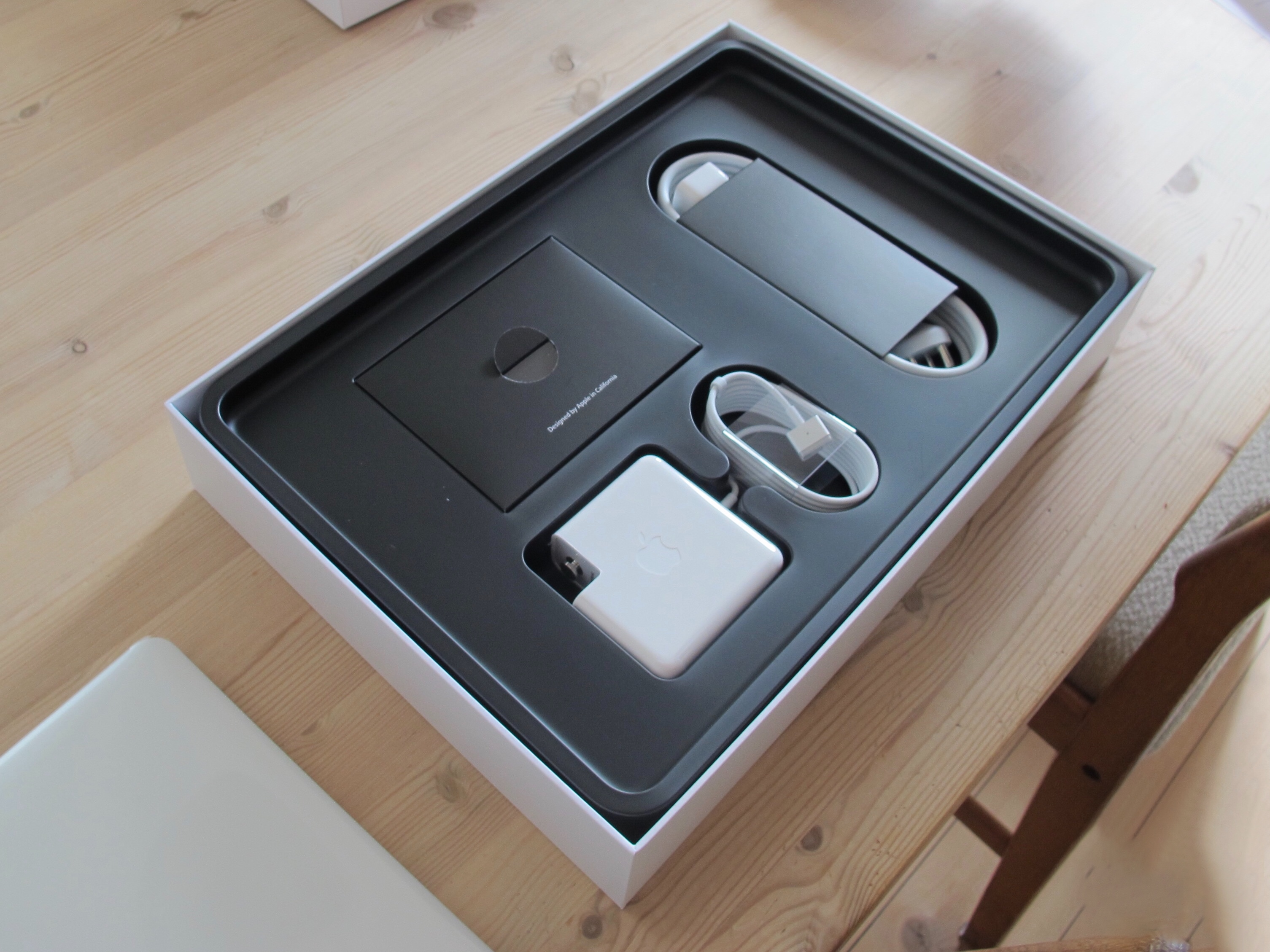 med ostemad og bare tæer